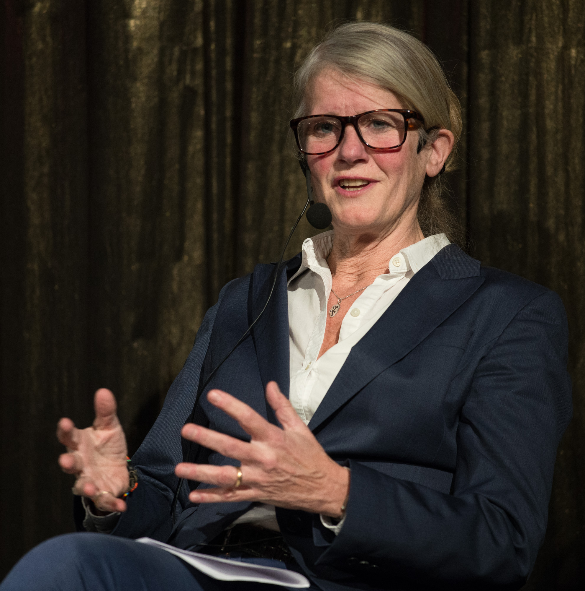 Jannike Åhlund i ett samtal om filmen och personen Joe Hill på Folkets Bio i Stockholm den 19 november 2015.